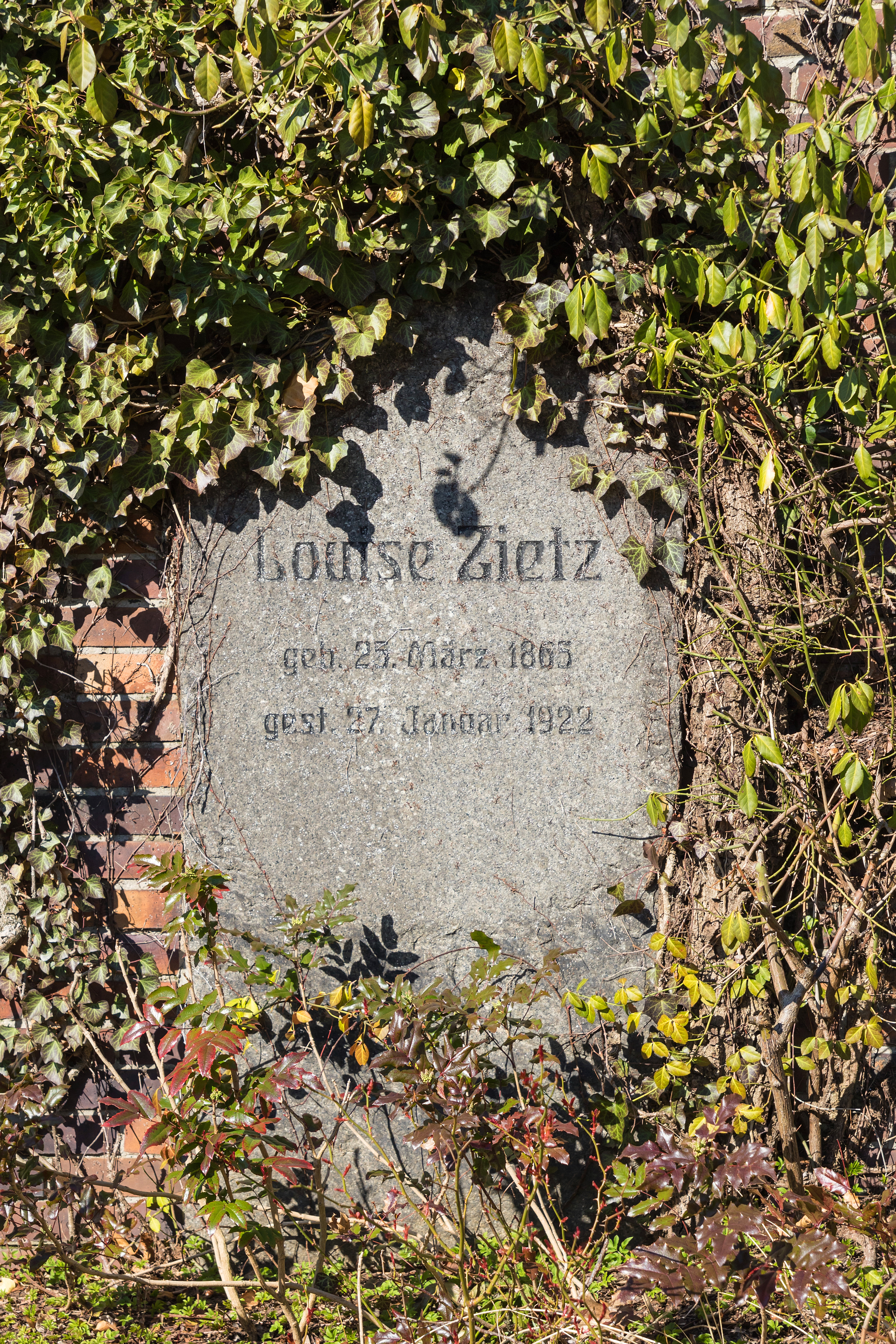 Zentralfriedhof Friedrichsfelde, Berlin-Lichtenberg. Gedenkstätte der Sozialisten, Grab von Luise Zietz.